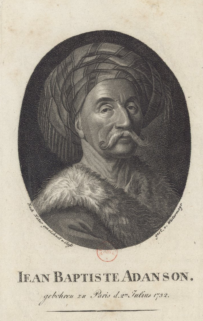 Jean-Baptiste Adanson (1732-1804)